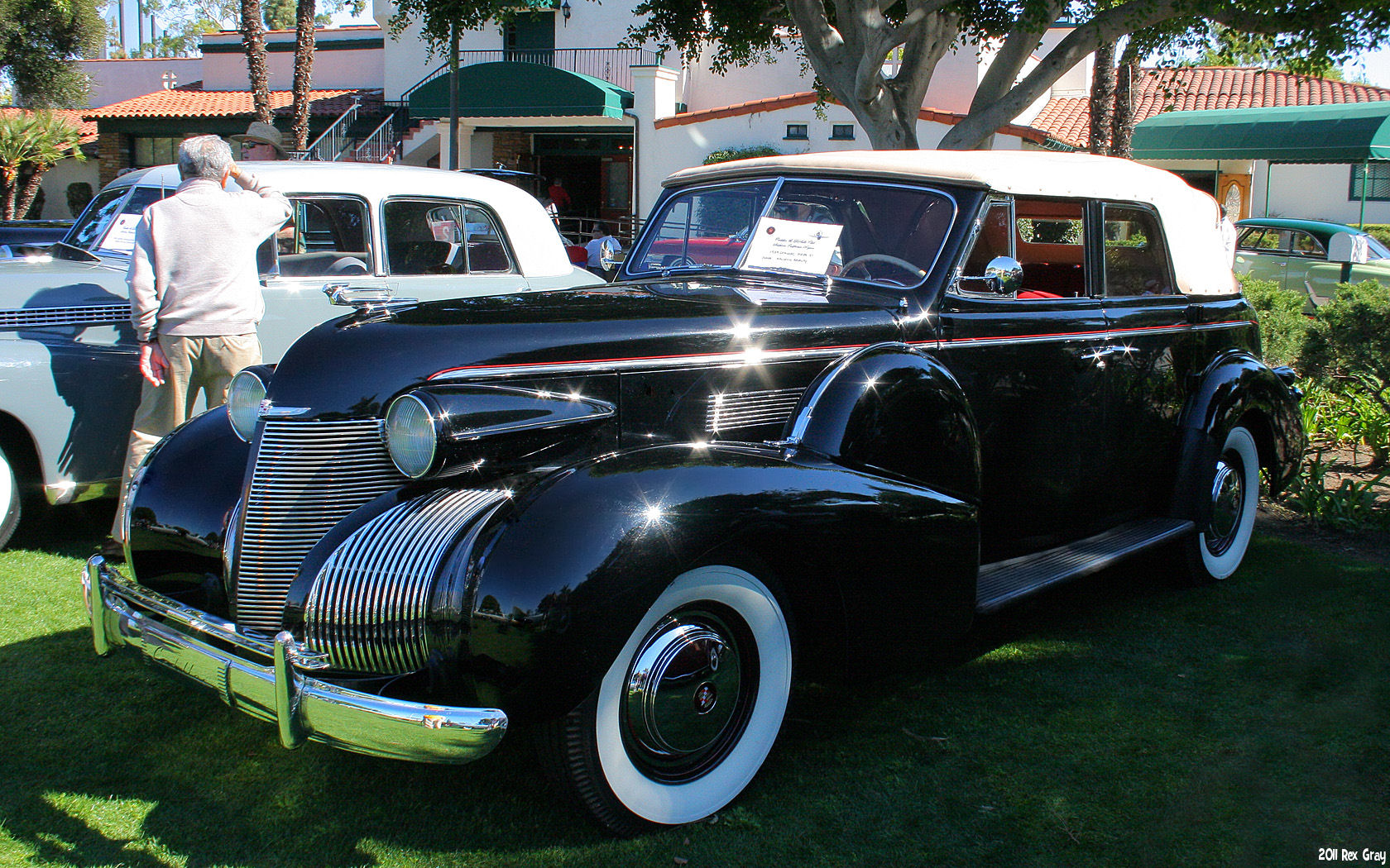 1939 Cadillac Series 61 convertible